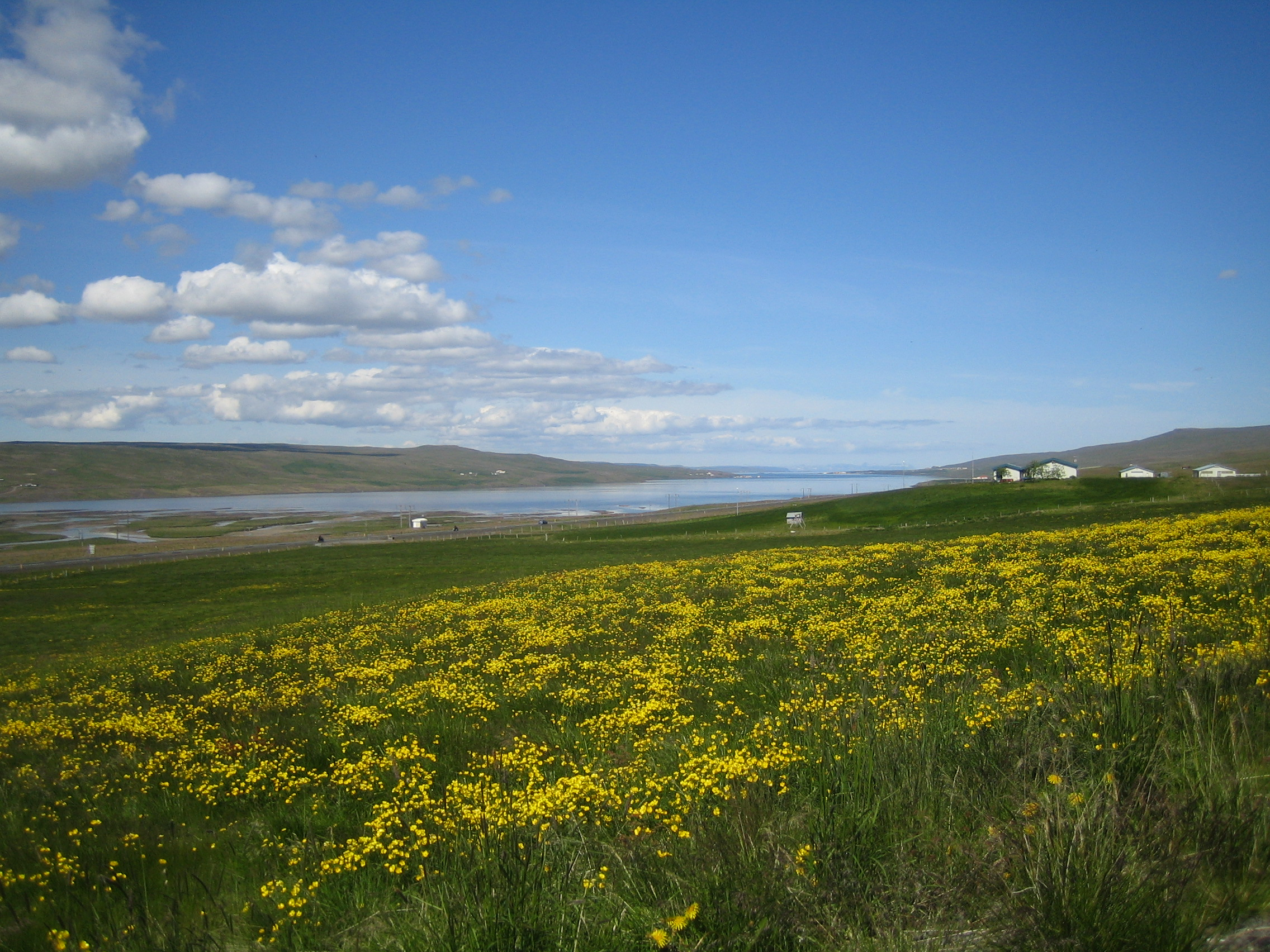 Hrútafjörður séður frá Stað